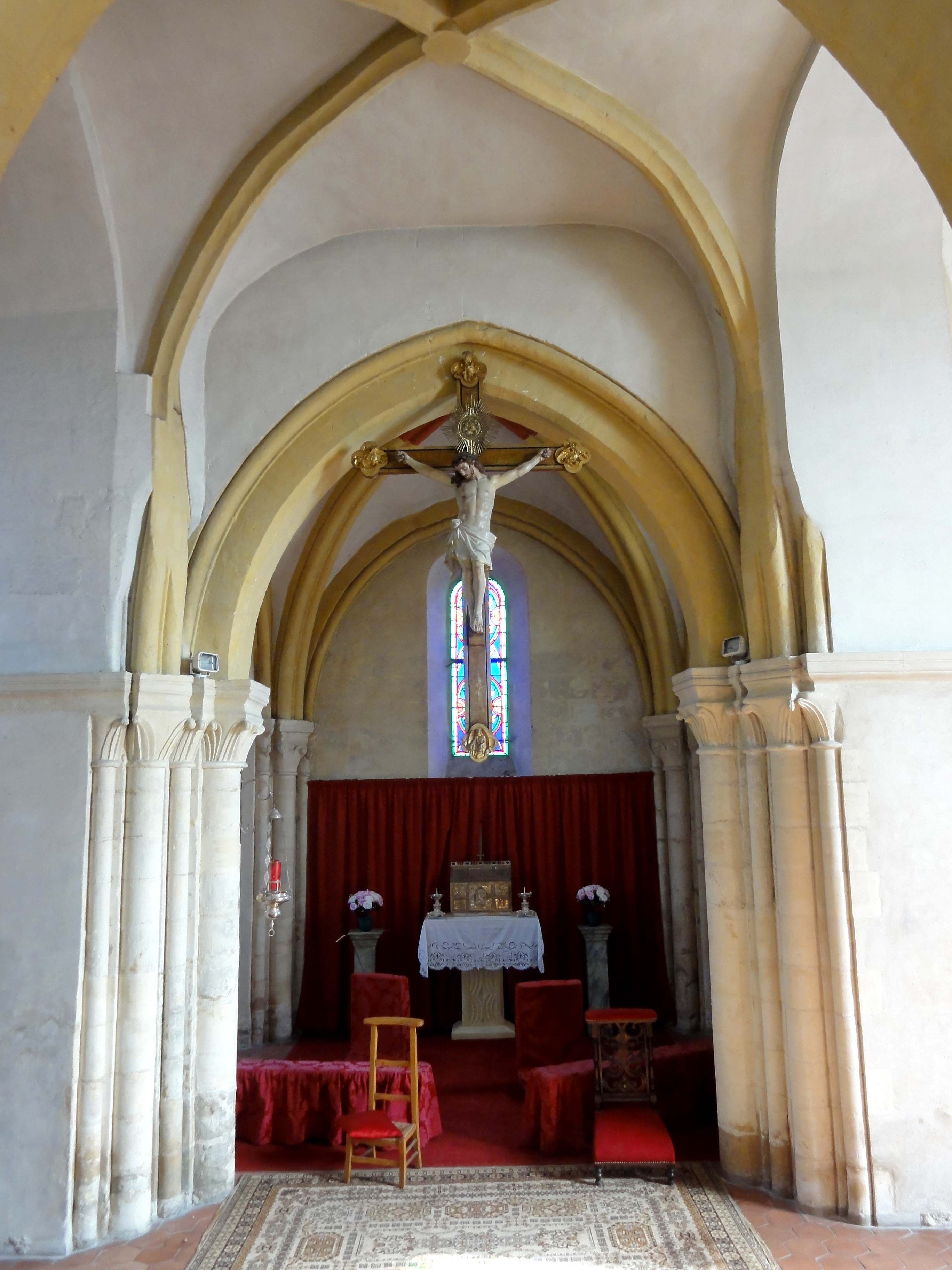 Intérieur de l'église - voir titre.